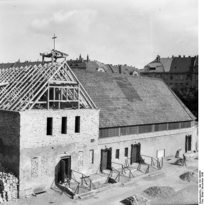 Berlin, Offenbarungskirche in Rummelsburg. Von Gemeindemitgliedern erbaute Notkirche. Aufn.: Illus/Bödel 4118-49 6.11.49